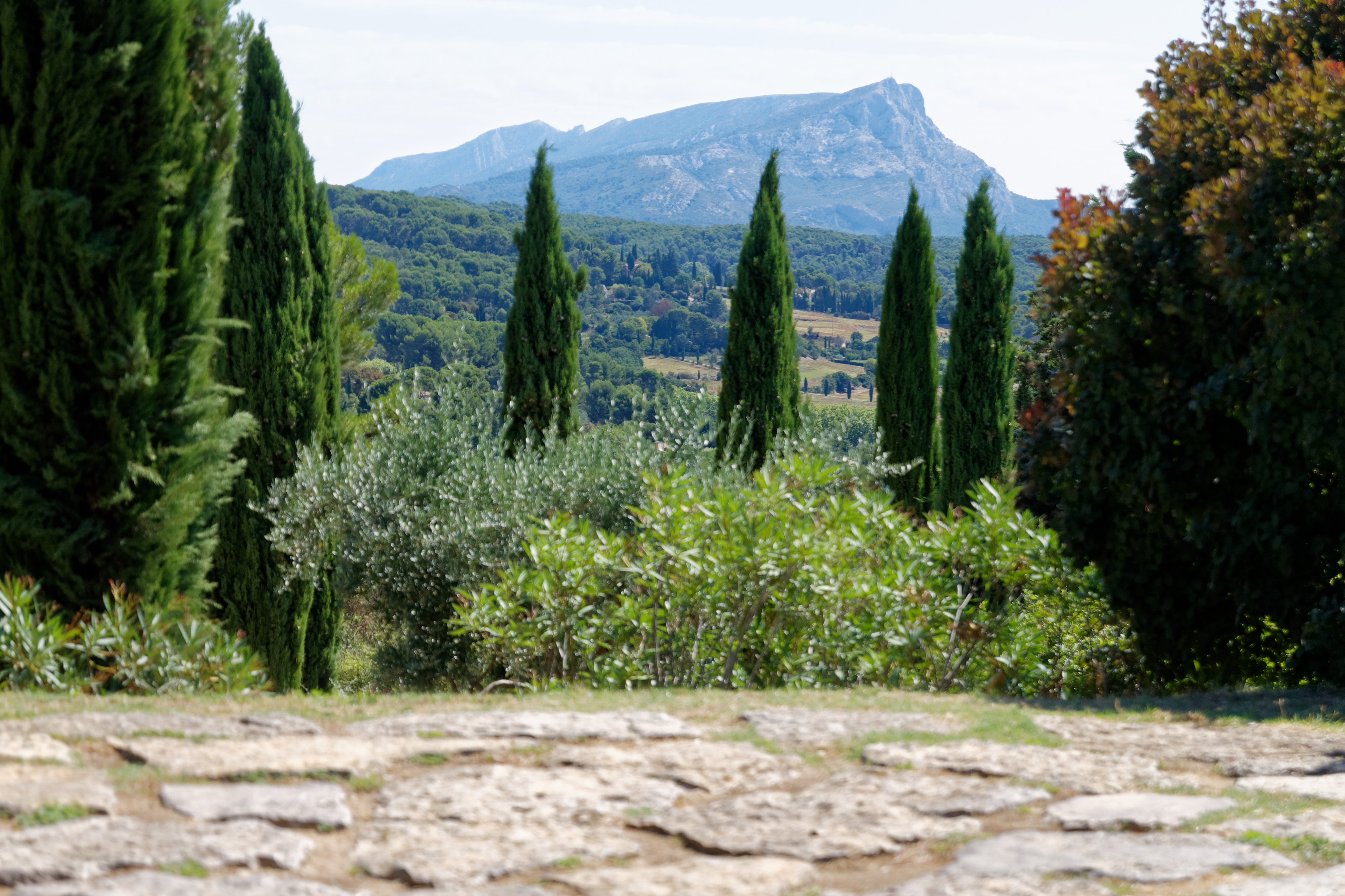 Terrain des Paintres, Aussichtspunkt in der Nähe des Atelier Cézanne, wo Paul Cézanne einige seiner Bilder der Montagne Sainte-Victoire malte